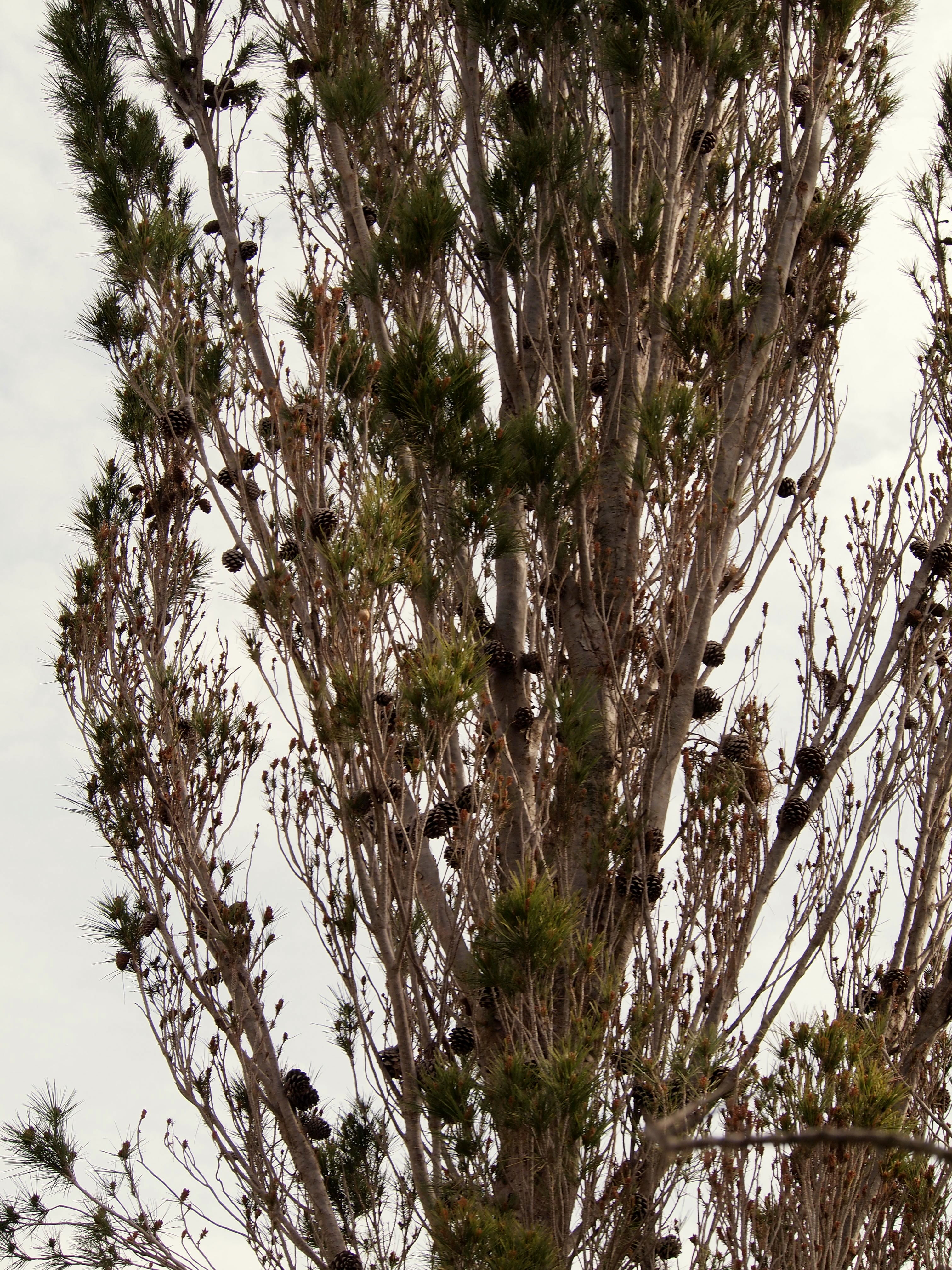 Pi d'en Llorens o Pinus halepensis var. ceciliae. Exemplar cultivat a la Marina de Llucmajor (Mallorca).